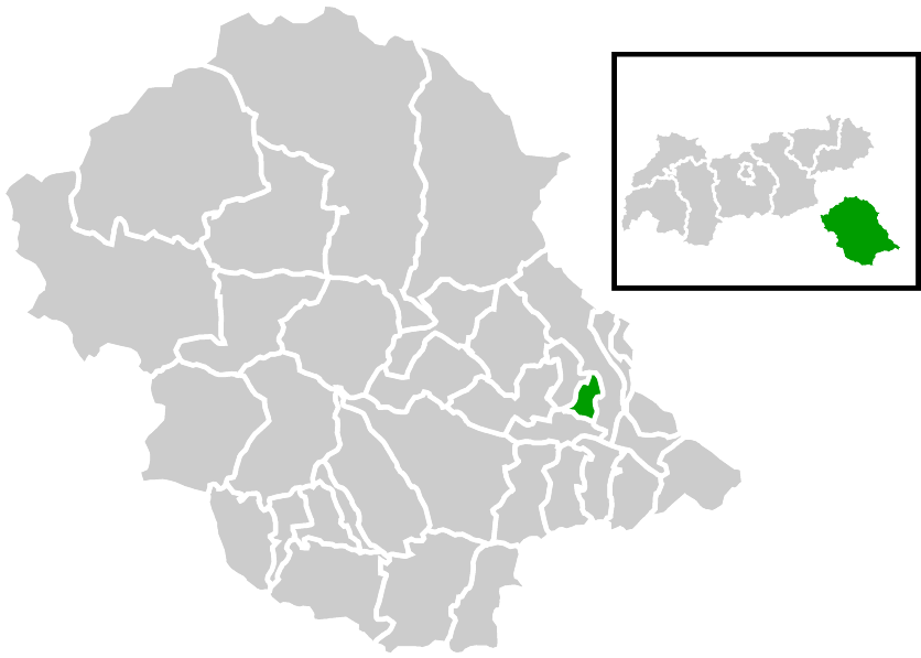 Lage der Gemeinde innerhalb des Bezirks Lienz